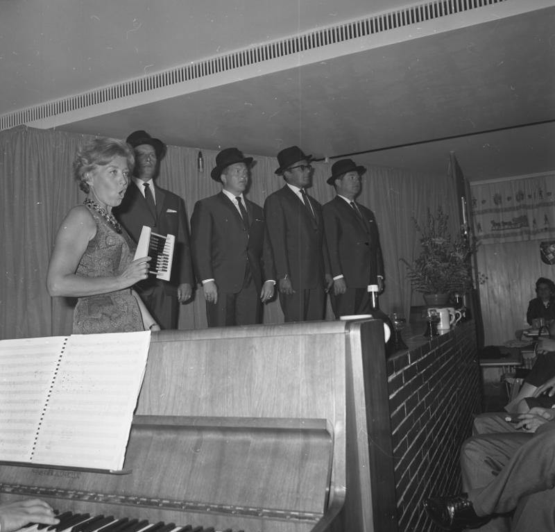 "Münchner Abend" Landesvertretung-Bayern Bonn